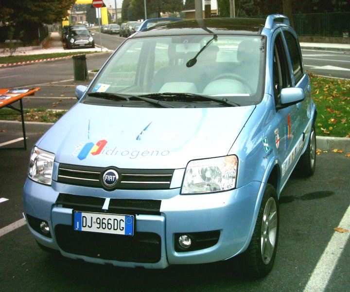 Prototipo Fiat Panda Hydrogen del 2006 fotografato all'Expo "AlternativaMente" di Medole nel 2007